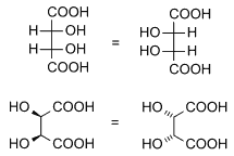 meso tartaric acid